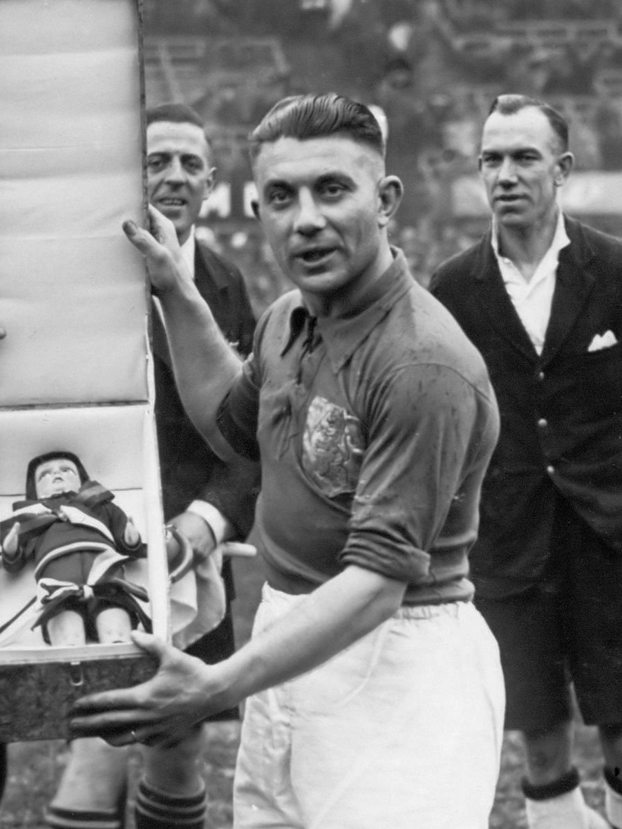 Puck van Heel voor aanvang van de wedstrijd tegen België gehuldigd voor het spelen van zijn 60e interland. Nederland - België (7-2), gespeeld op 27 februari 1938 in het Feyenoord-stadion (De Kuip) te Rotterdam. 27 februari 1938